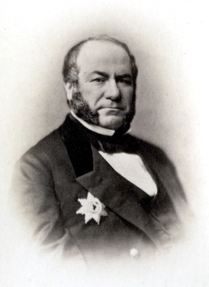 Штиглиц, Александр Людвигович